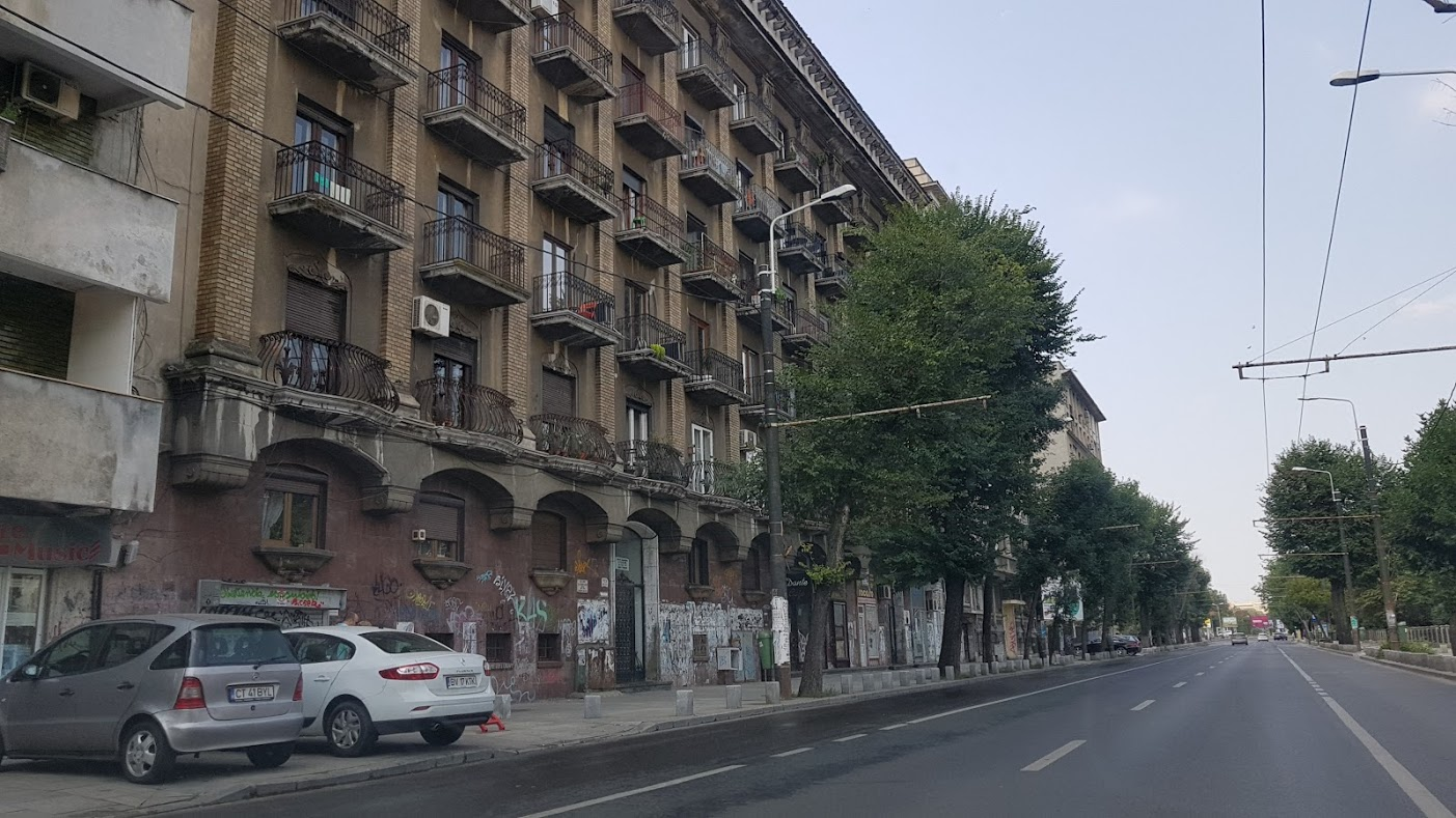 Blocul din Bdul. Elisabeta 95 (actualmente Kogălniceanu 49) unde locuit începând cu toamna anului 1938 criticul Eugen Lovinescu. Aici s-au ținut şedinţele Cenaclului Sburătorul.